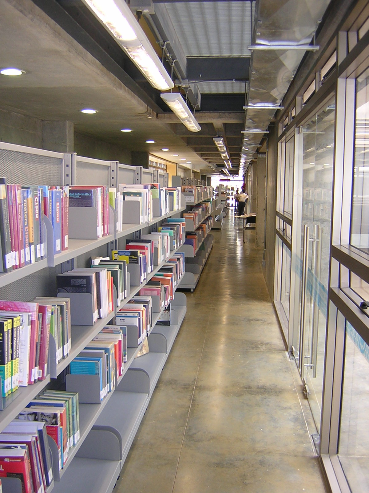 Biblioteca San Javier, Medellín, Colombia